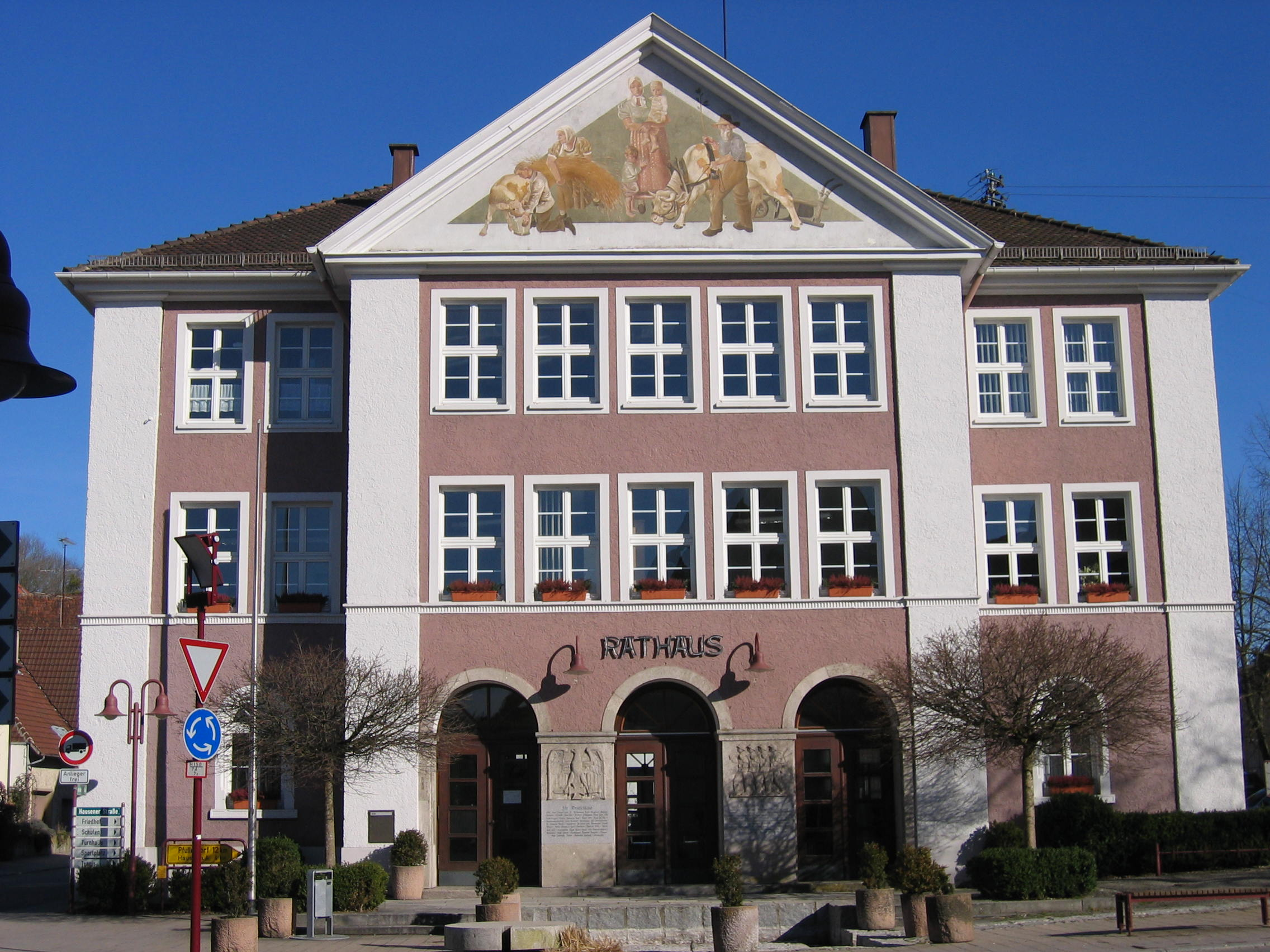 Rathaus Krauchenwies